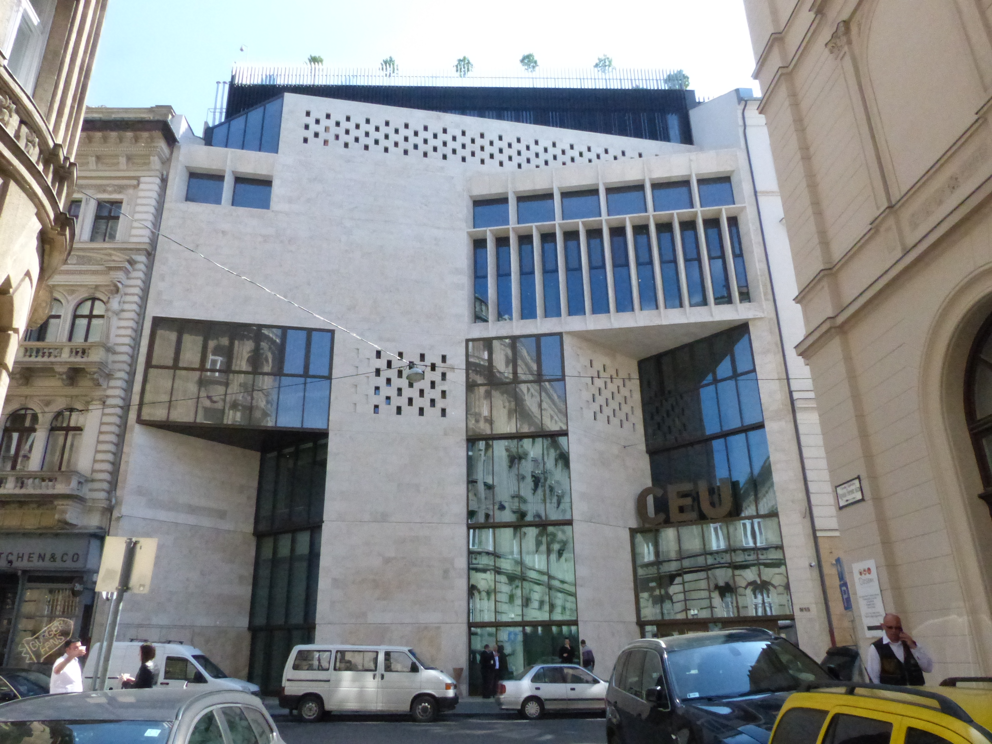 A Közép-európai Egyetem épülete a Nádor utcában, Budapesten. A felvétel 2017. május 11-én készült.